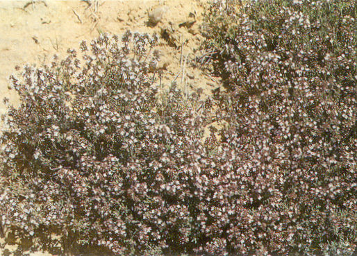 Thymus vulgaris, tomillo vulgar. Torrecuadrada de los Valles, Guadalajara, España